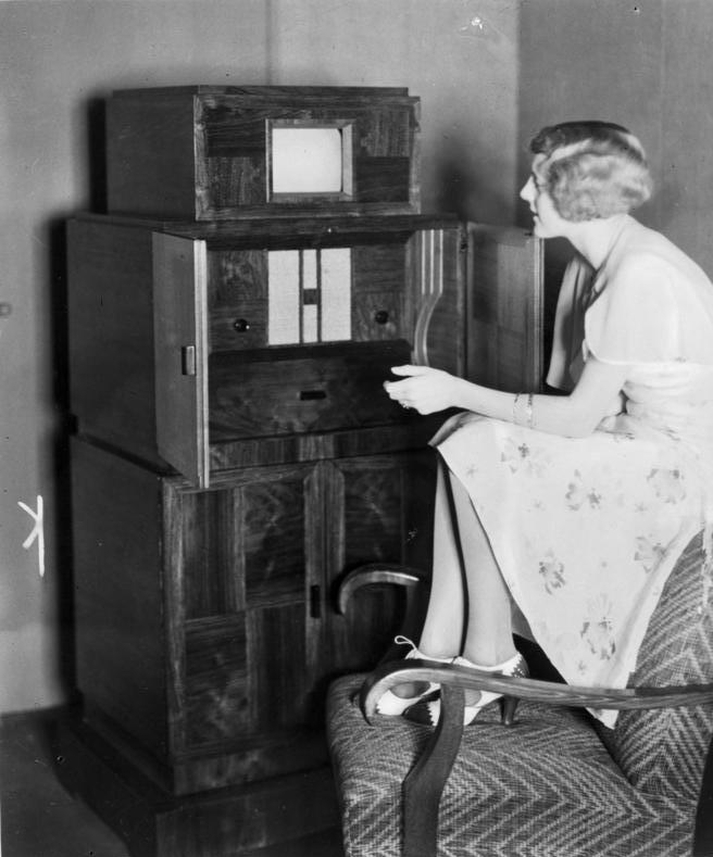 Scherl: 1933: Kombinierter Fernseh- und Rundfunkempfänger der Firma Telefunken Information added by Wikimedia users. Telefunken FE I (1932/33)[1] References ↑ Telefunken, Early Electronic TV Gallery, Early Television Foundation.